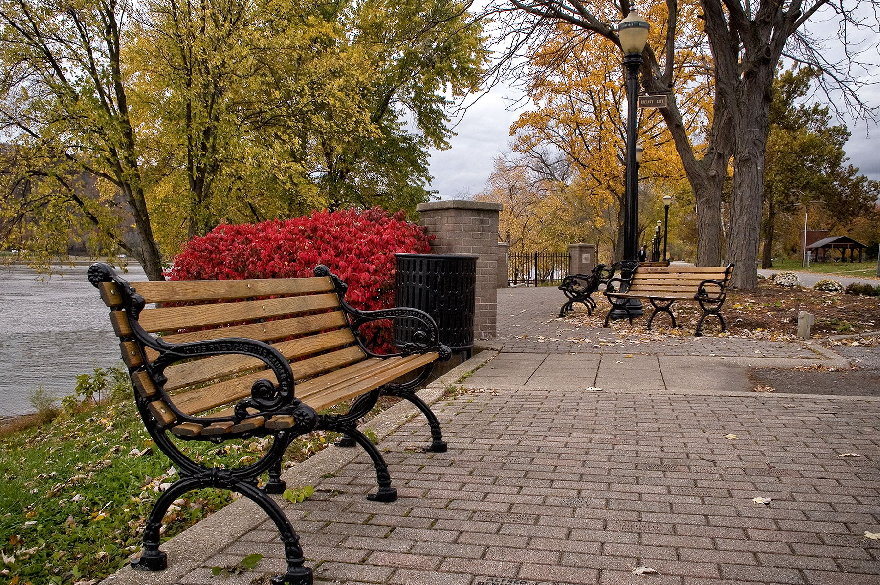 Скамья в парке